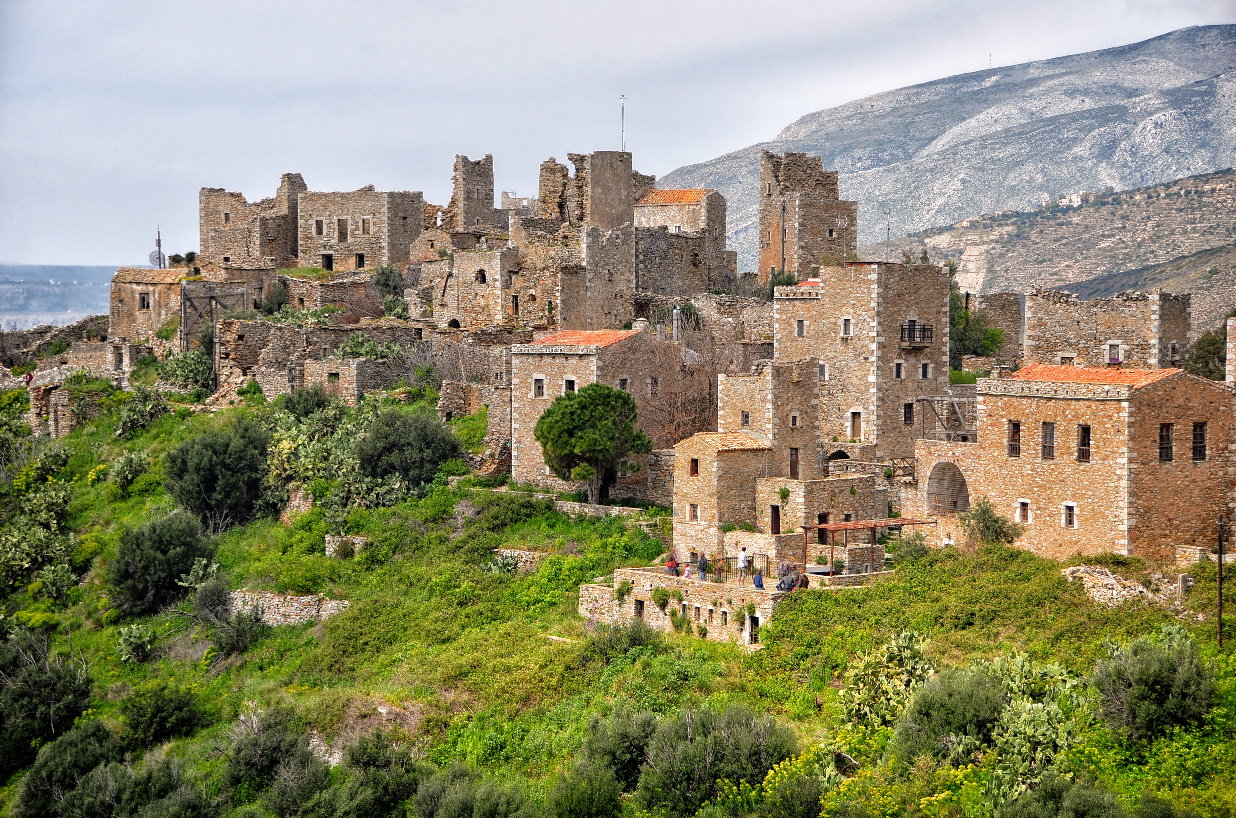 Πύργοι στη Βάθεια«Πύργοι στη Βάθεια»